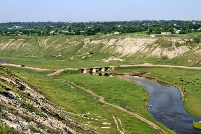 Răul Răut pe lăngă satul Ștefănești din r Florești.